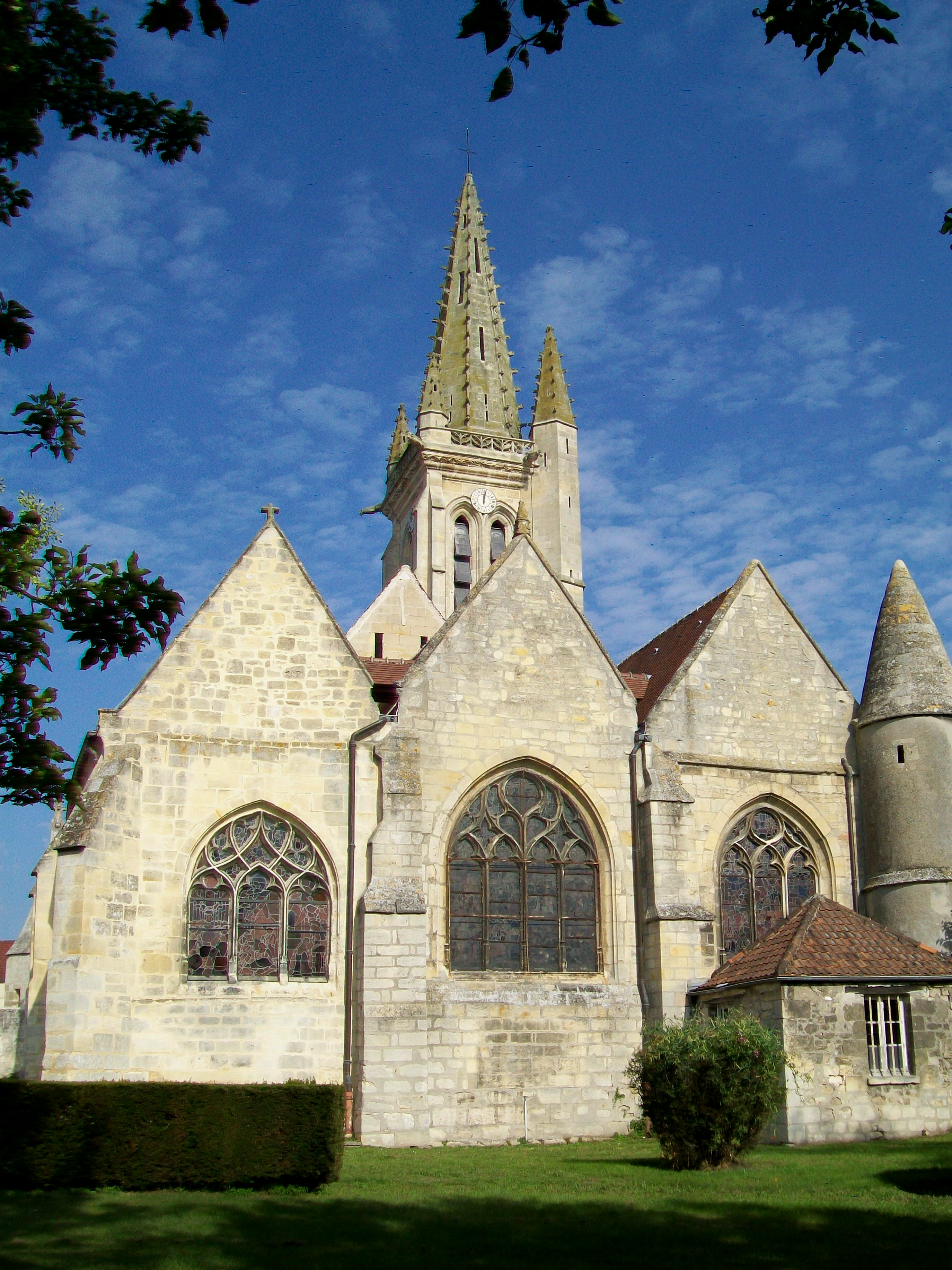 Le chœur à chevet plat du XVe siècle.